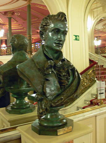 Teatro Arriaga, Bilbao.